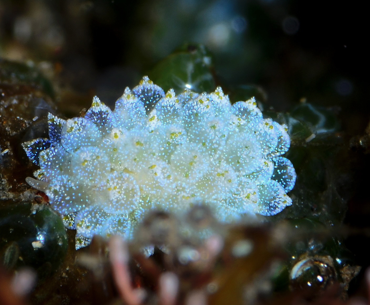 Une Ercolania coerulea à la Réunion.